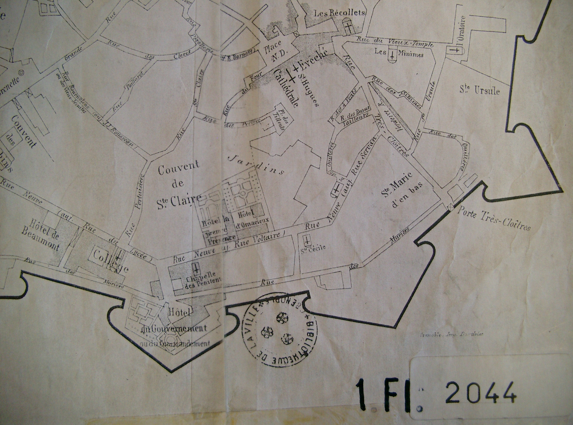 Plan du quartier de la rue Neuve et des établissements.